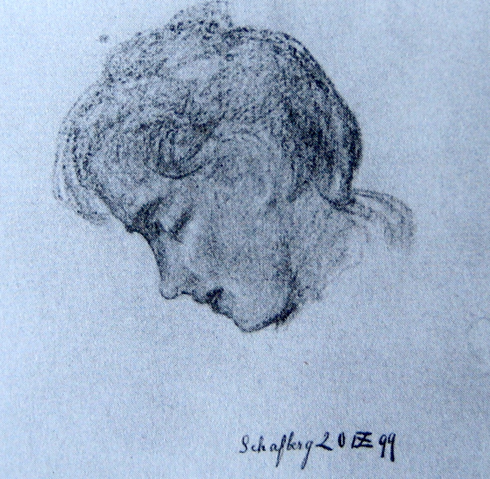 Studio di una testa